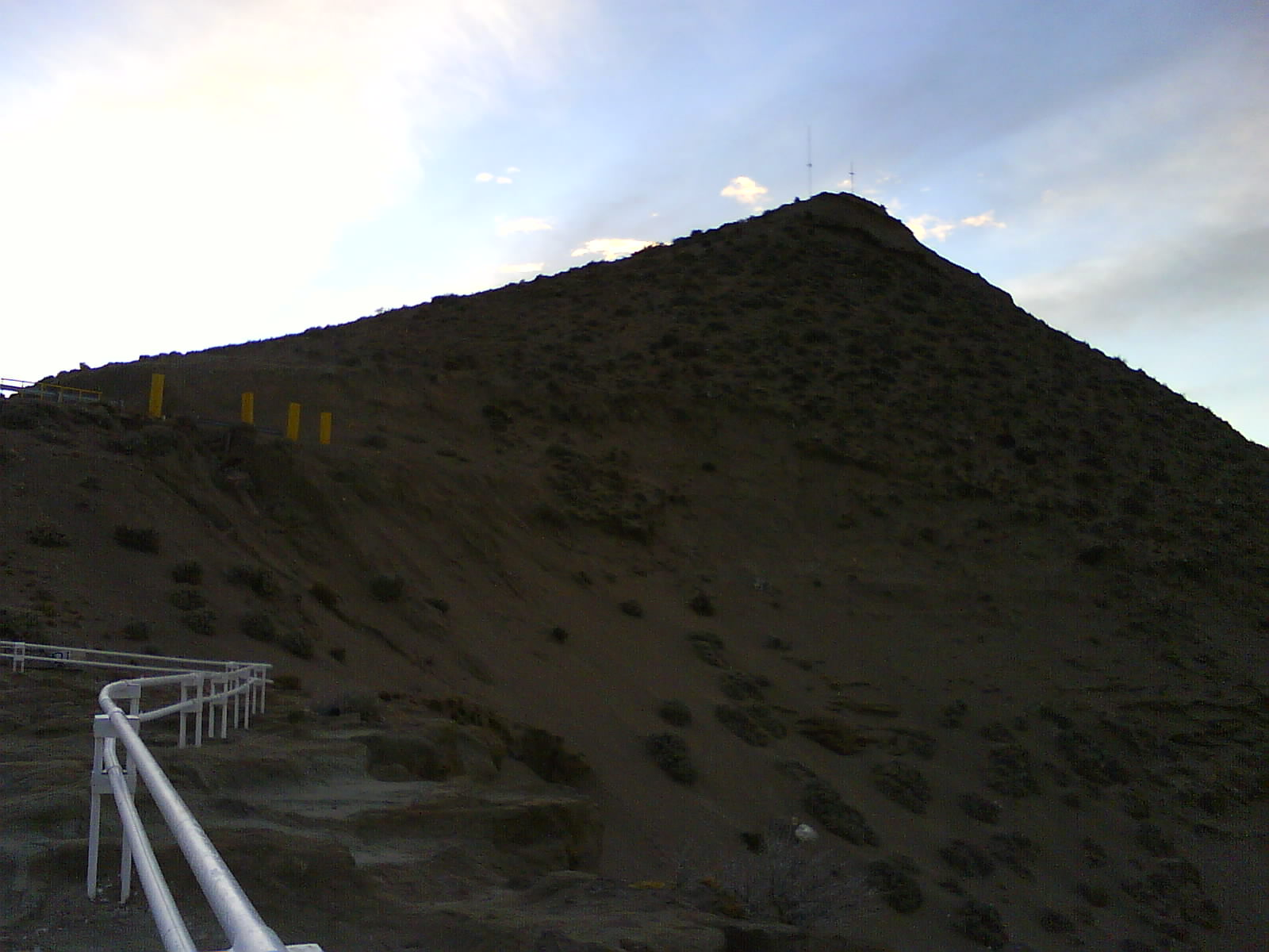 Vista desde el mirador de la cima del cerro Chenque